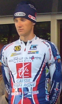 Le coureur cycliste letton Gatis Smukulis (VC La Pomme - Marseille) lors du Tour du Gévaudan 2008. Photo prise à Mende en septembre 2008.